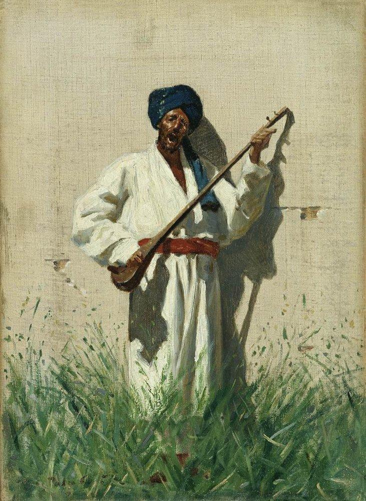 Дутарист